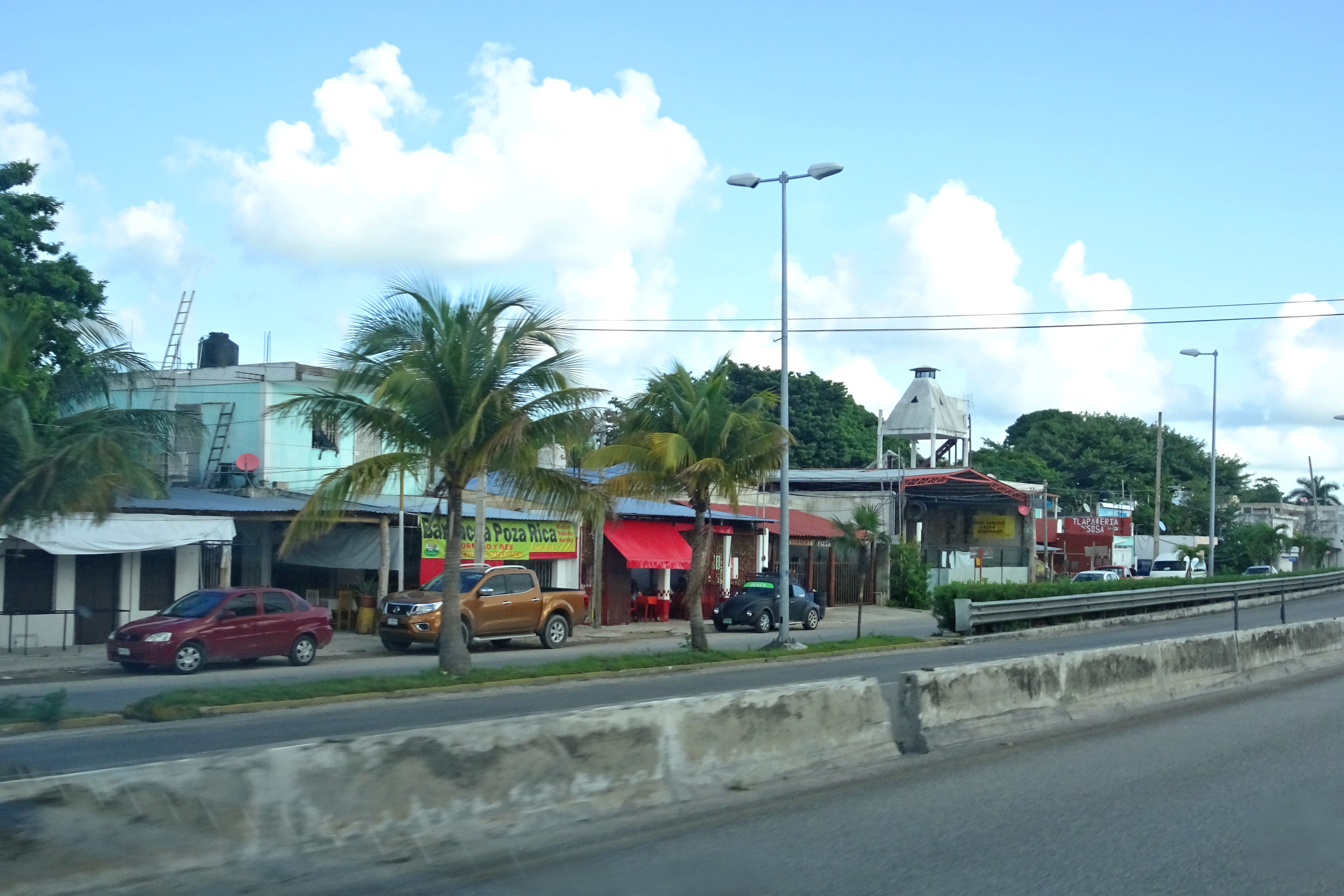 Joaquín Zetina Gasca, Puerto Morelos, Quintana Roo, Mexico